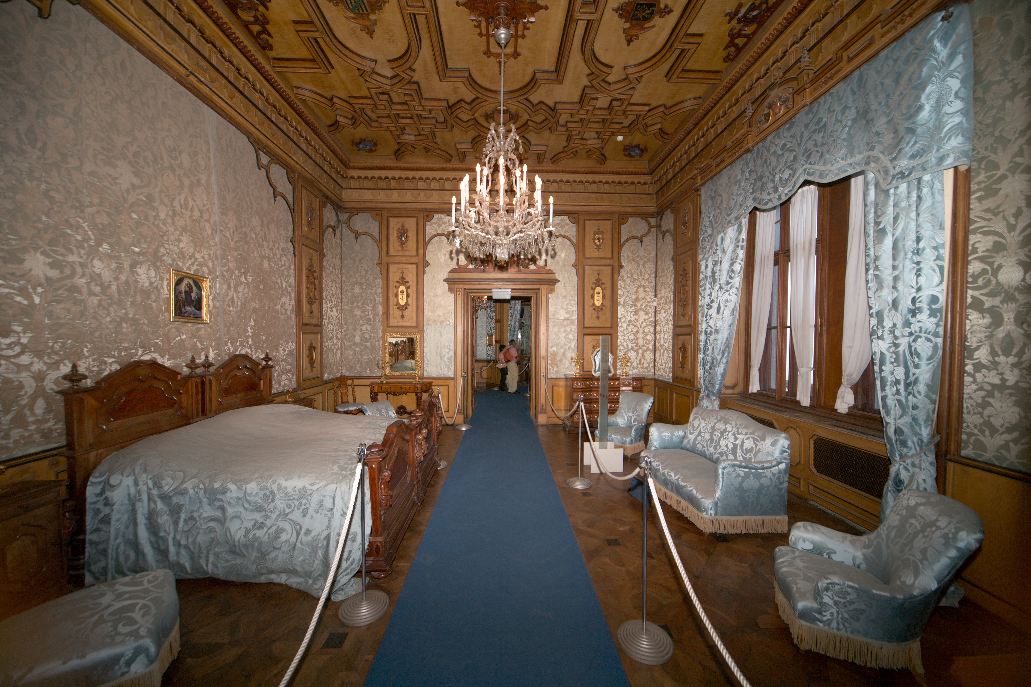 Castello Miramare interior